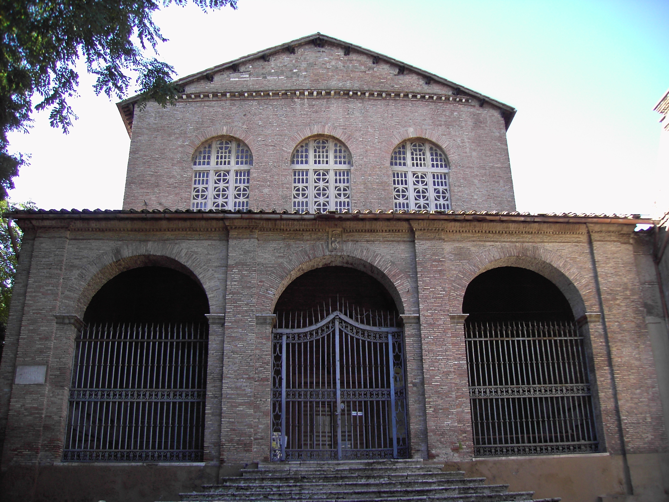 Santa Balbina a Roma. Foto by Lalupa.